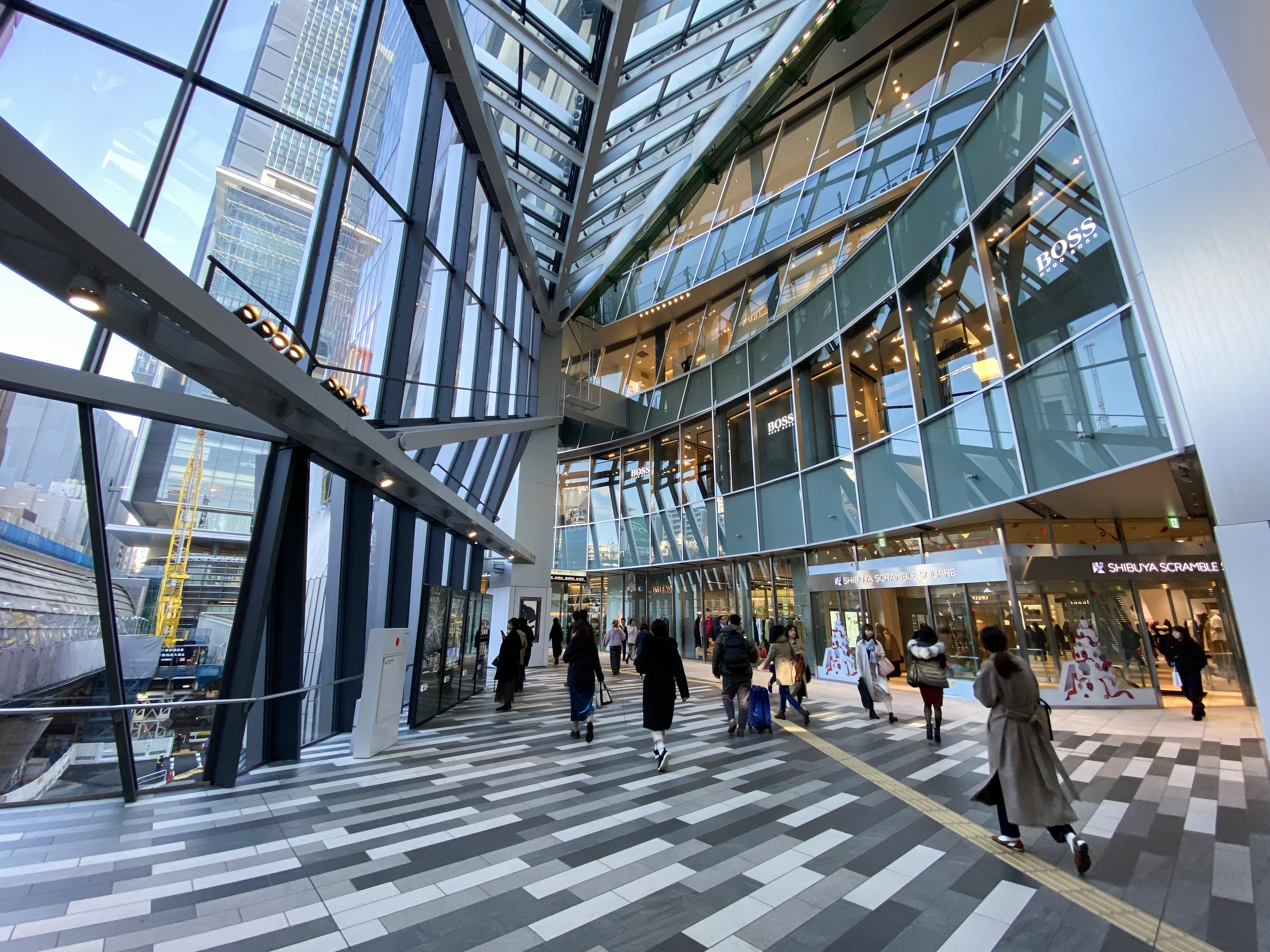 Shibuya Scramble Square Level 2 access